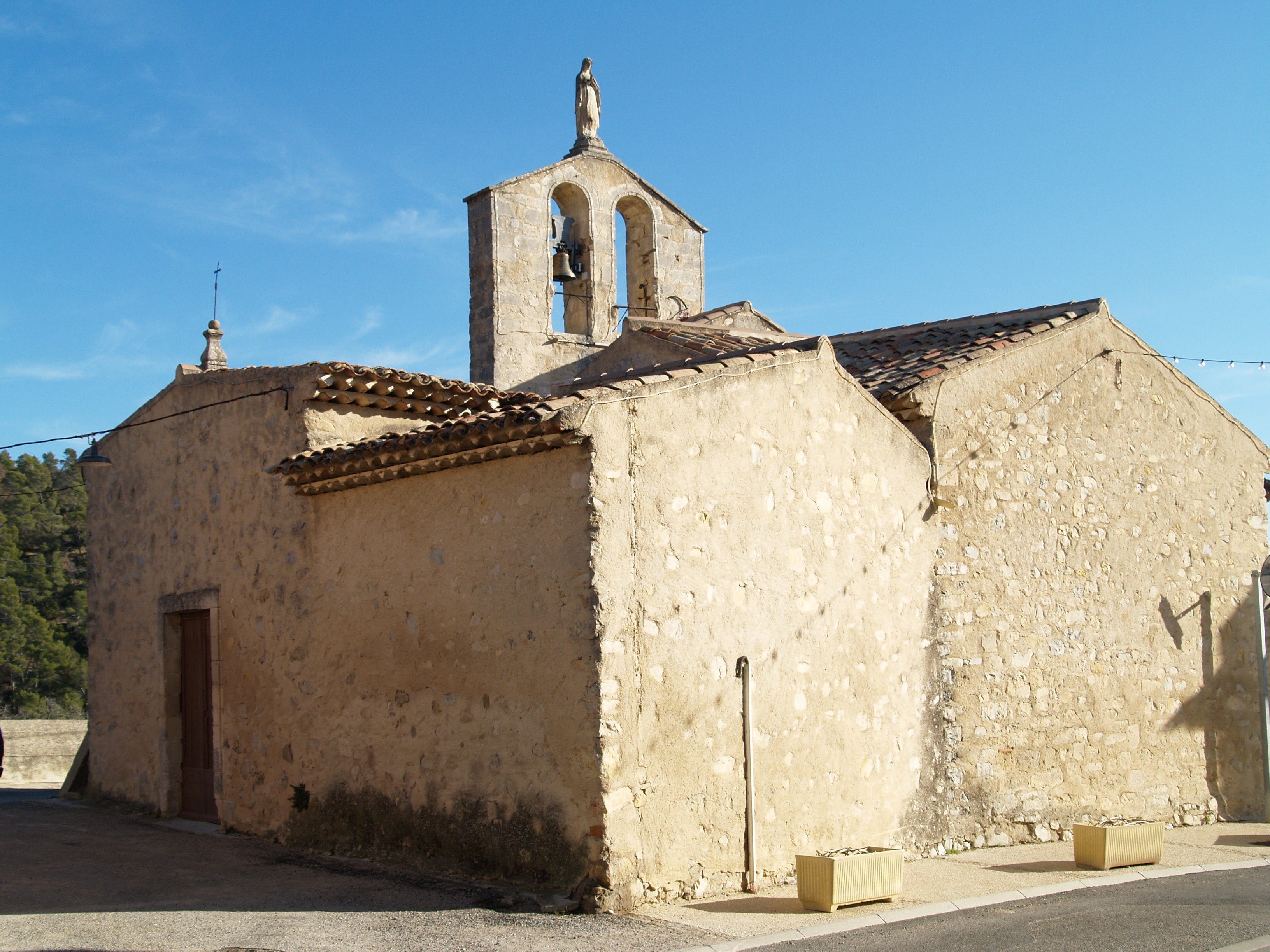 Eglise de Vitrolles